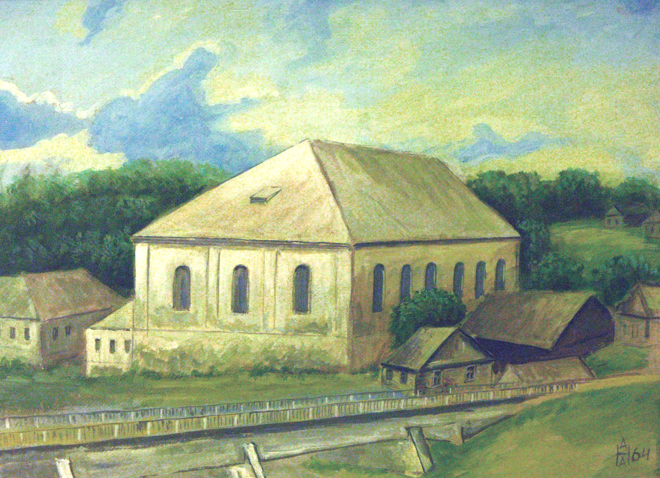 Синагога в Друе, 1964 год. Яичная темпера. ДВП. Художник Анатолий Александрович Наливаев.